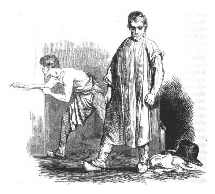 Les Français peints par eux mêmes - Forgerons du Berry.